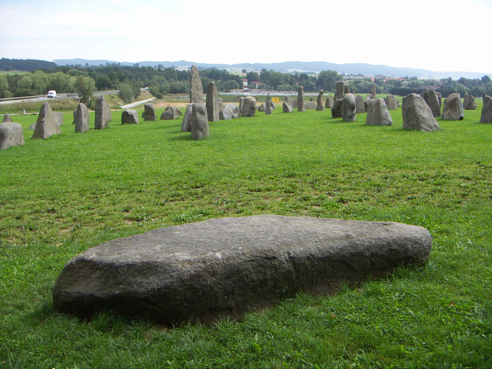 Basilika, 97 Diorite, von Franz Xaver Ölzant, in Waidhofen an der Thaya